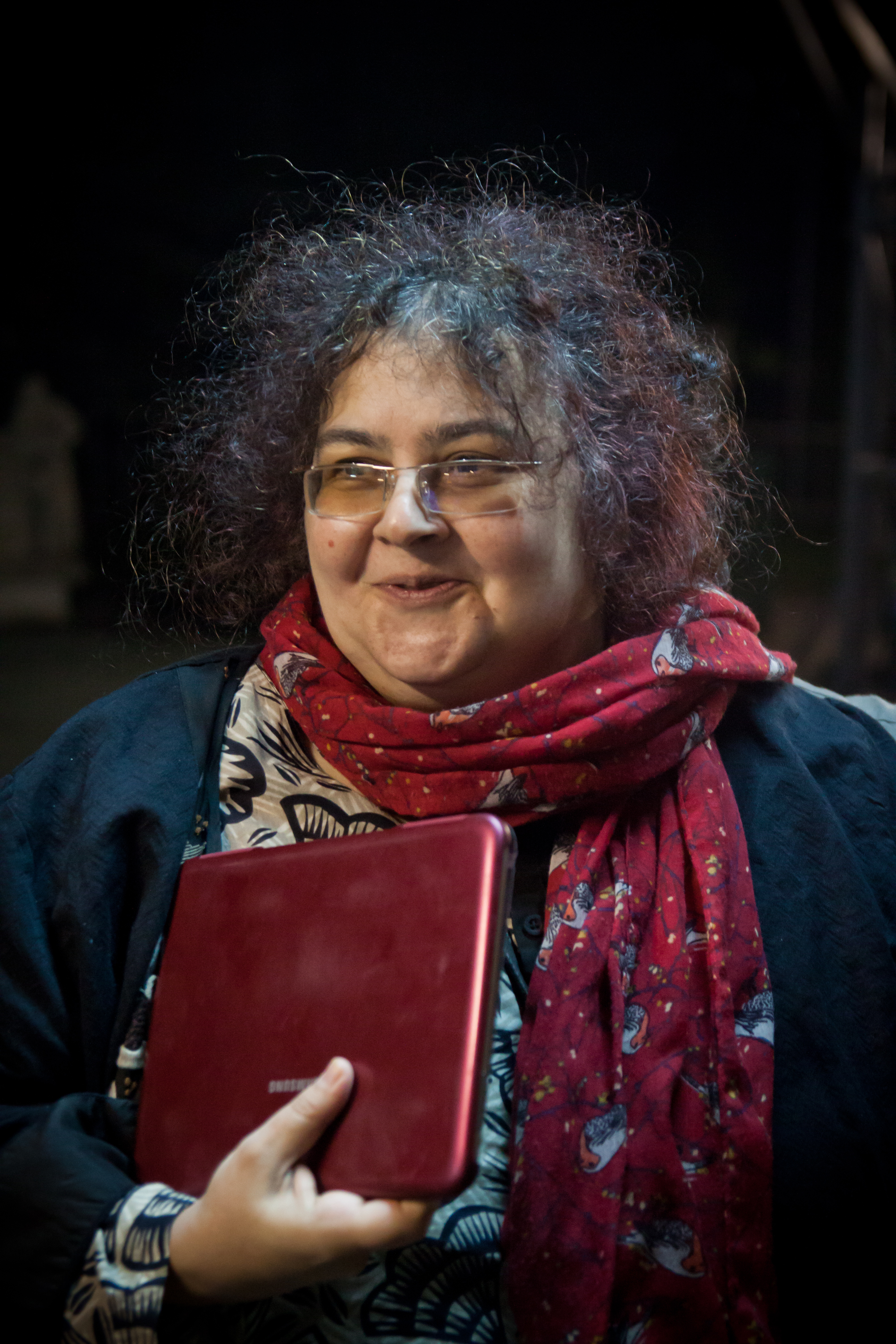 Драматург и сценарист Елена Гремина на показе фильма "Братья Ч" в летнем кинотеатре "Музеон"